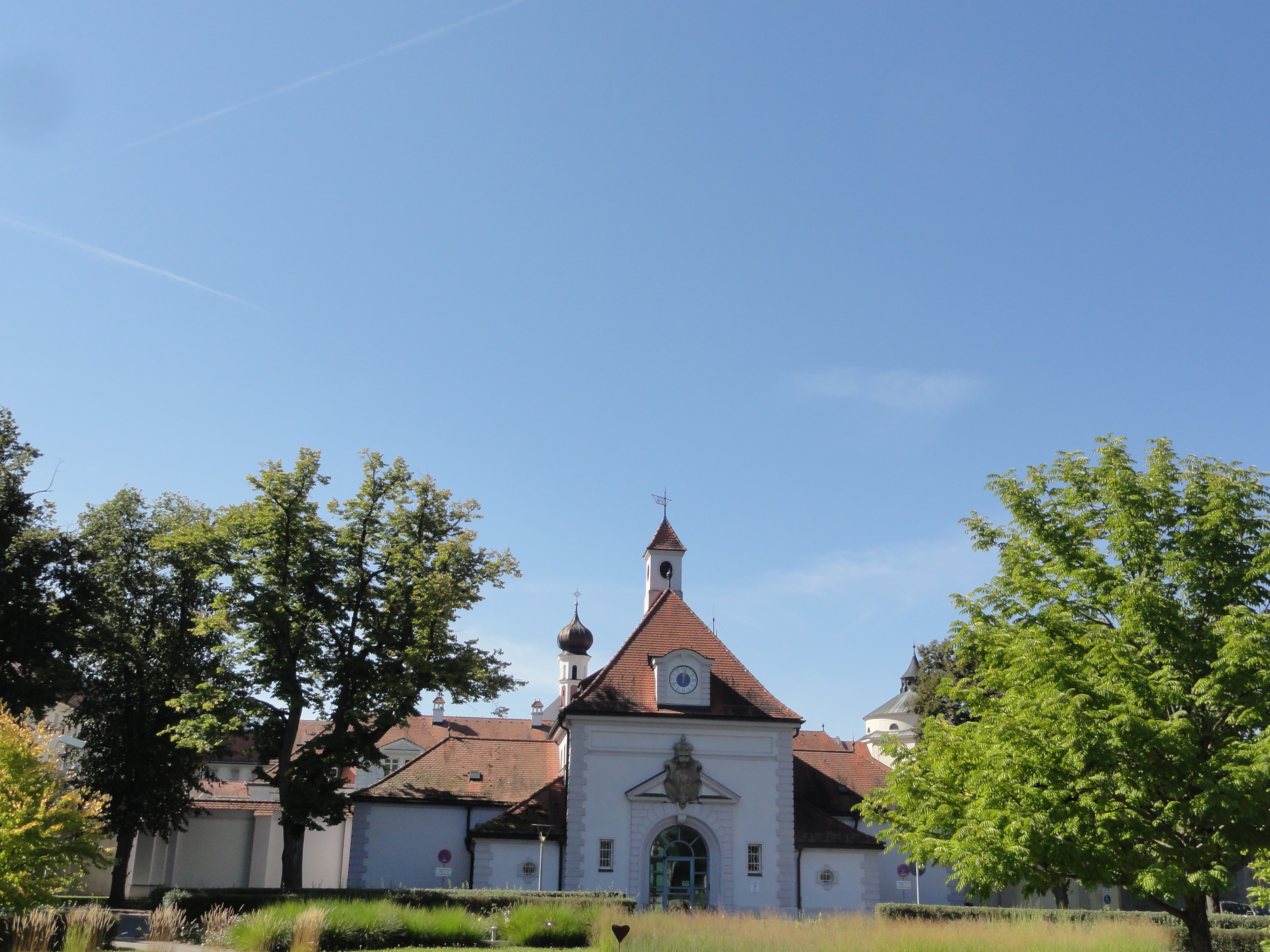 Justizvollzugsanstalt Straubing - Außenansicht (Eingang)] Info GPS data may be inaccurate. EXIF data regarding date and time may be inaccurate.